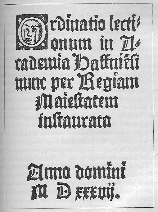 Ældste lektionskatalog fra Københavns Universitet 1537